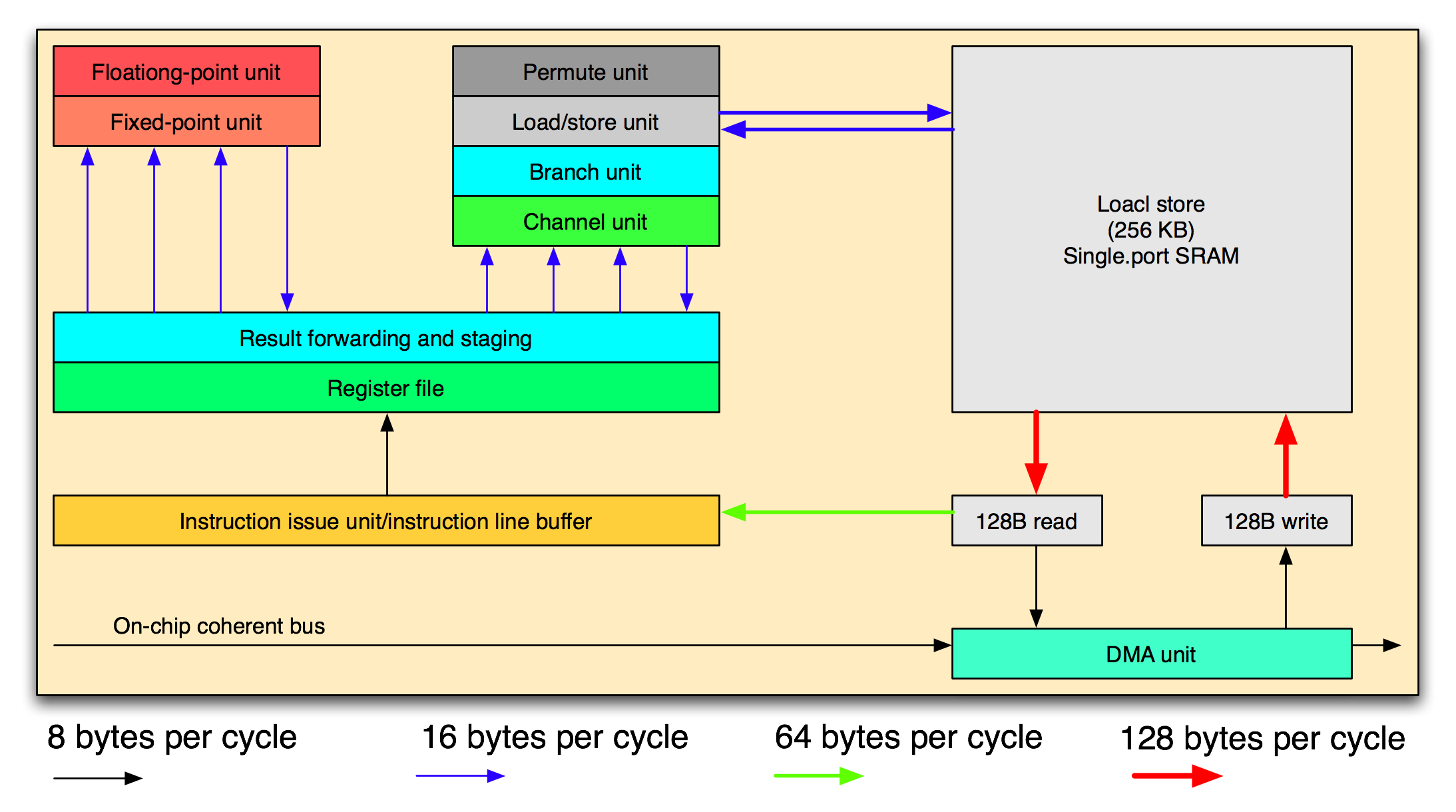 Schema SPE (processore Cell)